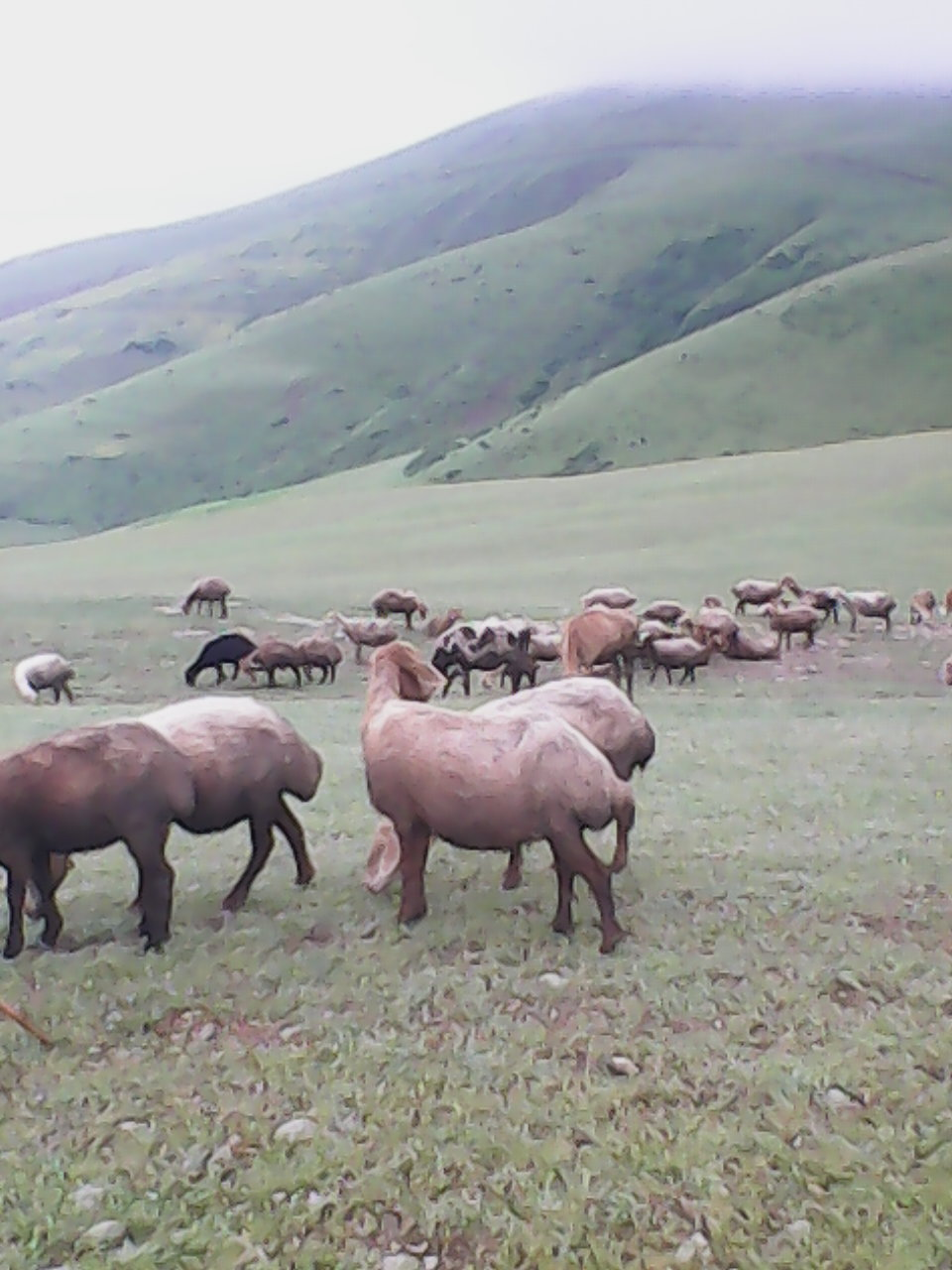 چرای دام درقجل - روستای قره یتاق